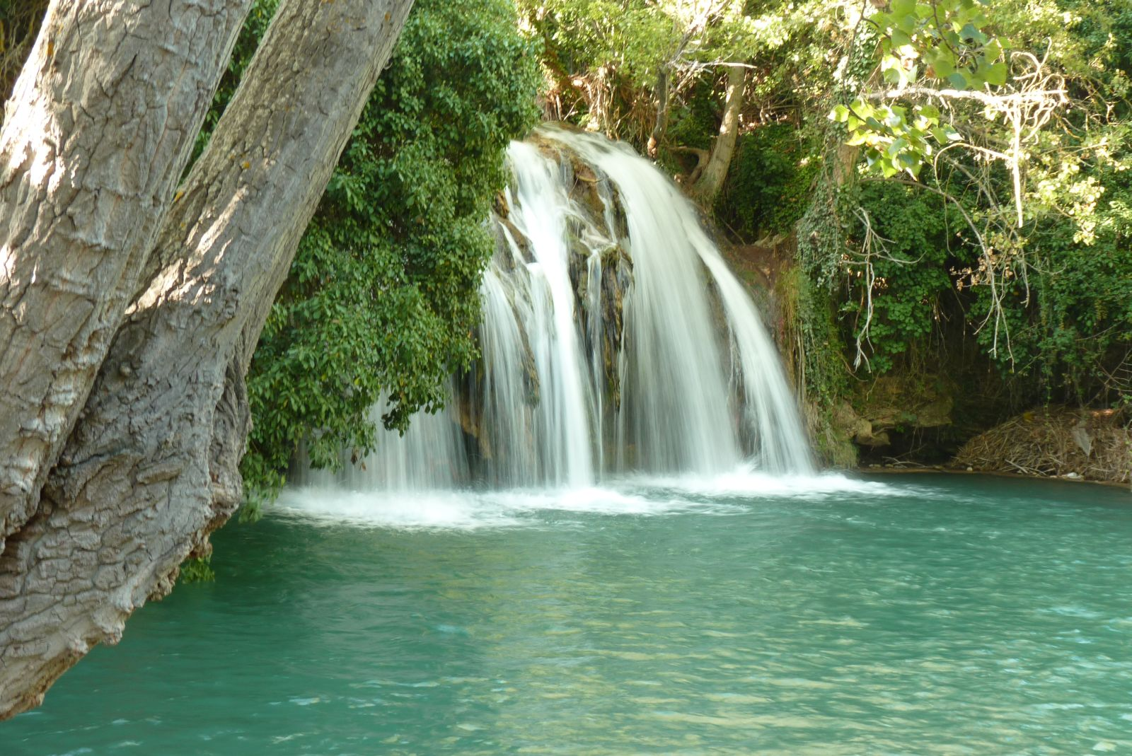 Vista del Pozo de los Chorros, un bonito salto de agua en el Rio Manubles a su paso por el pueblo zaragozano de Bijuesca.